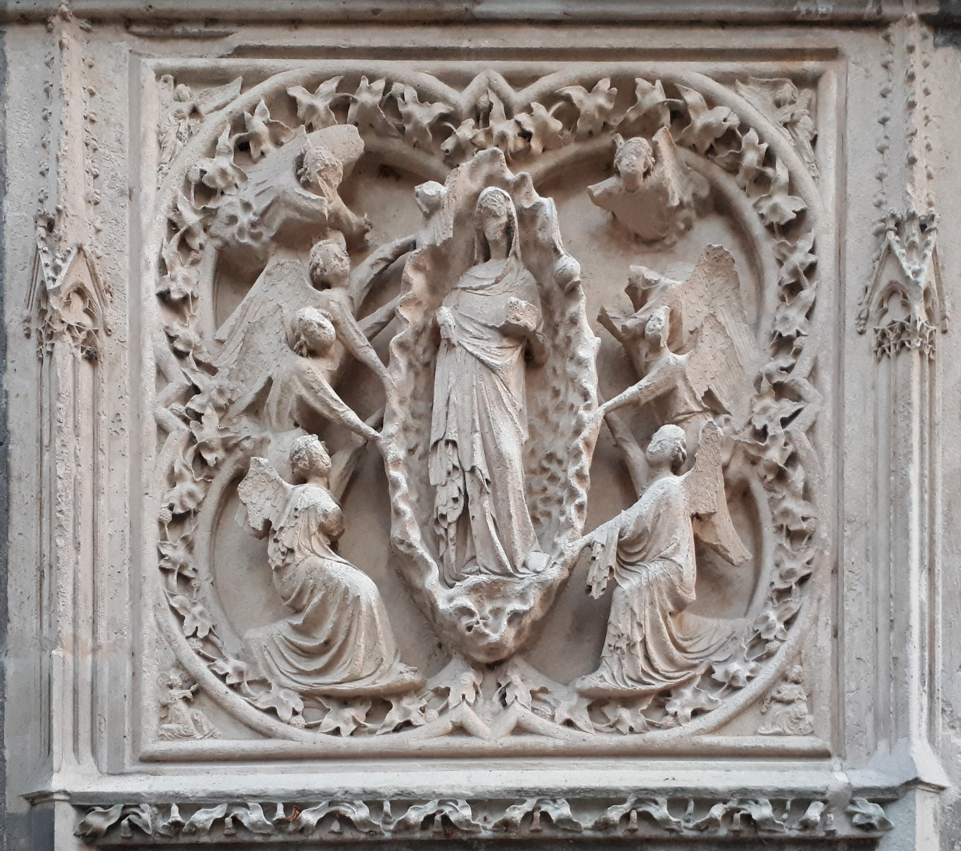 L'Assunzione della Vergine.